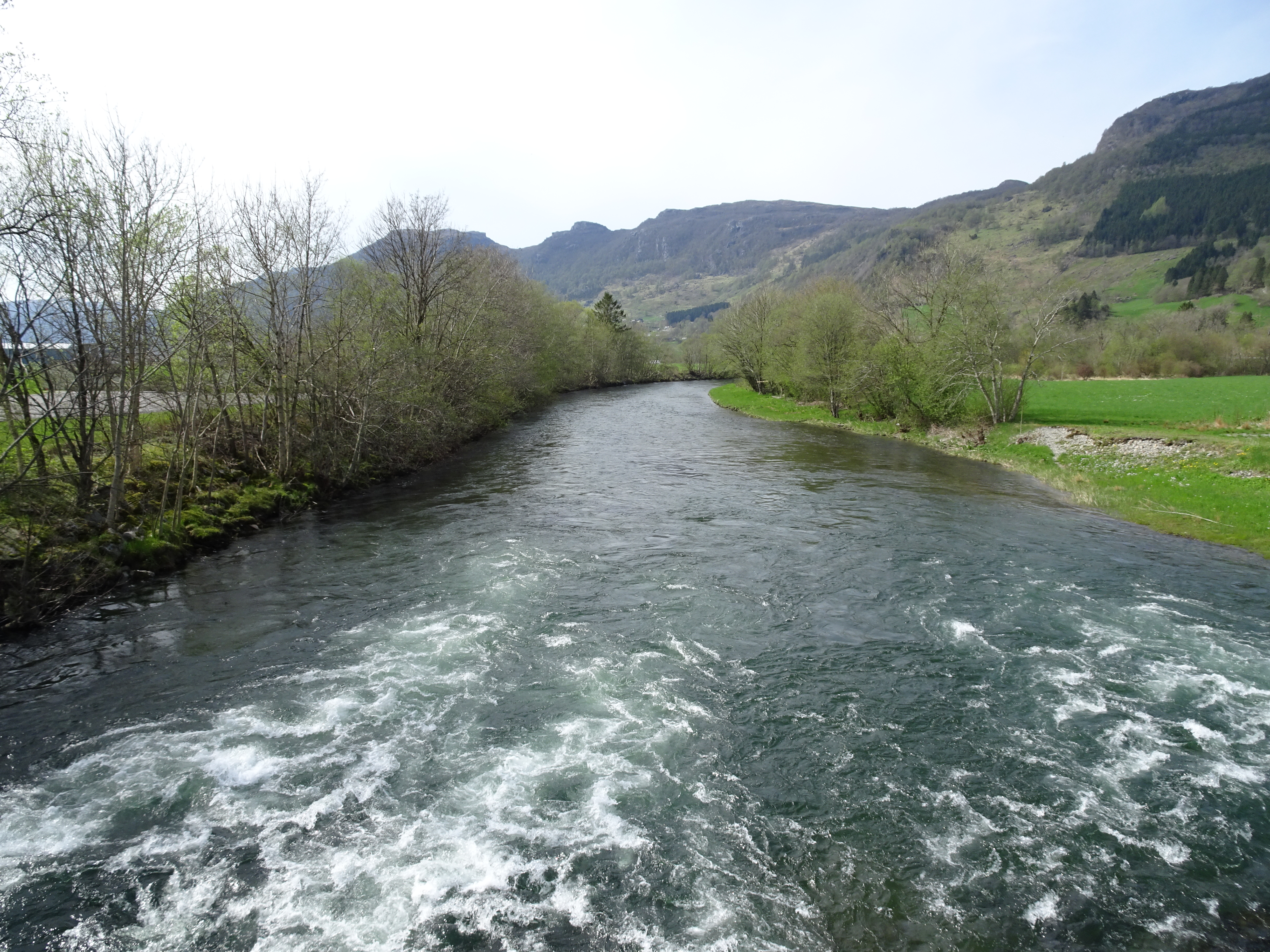 Etneelva nedstrøms fra Enge bru